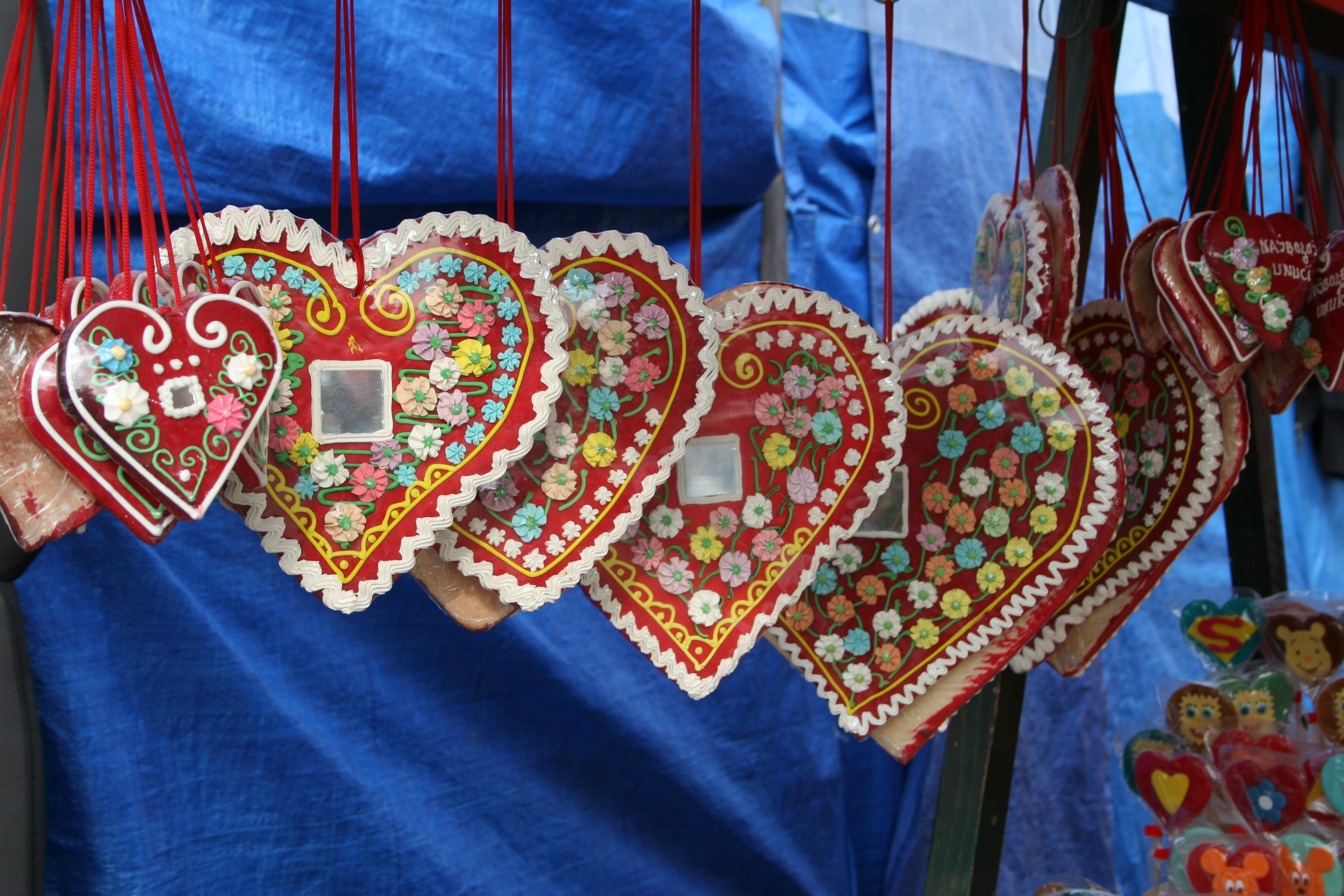 Šabački malogospojinski vašar 2016, Šabac